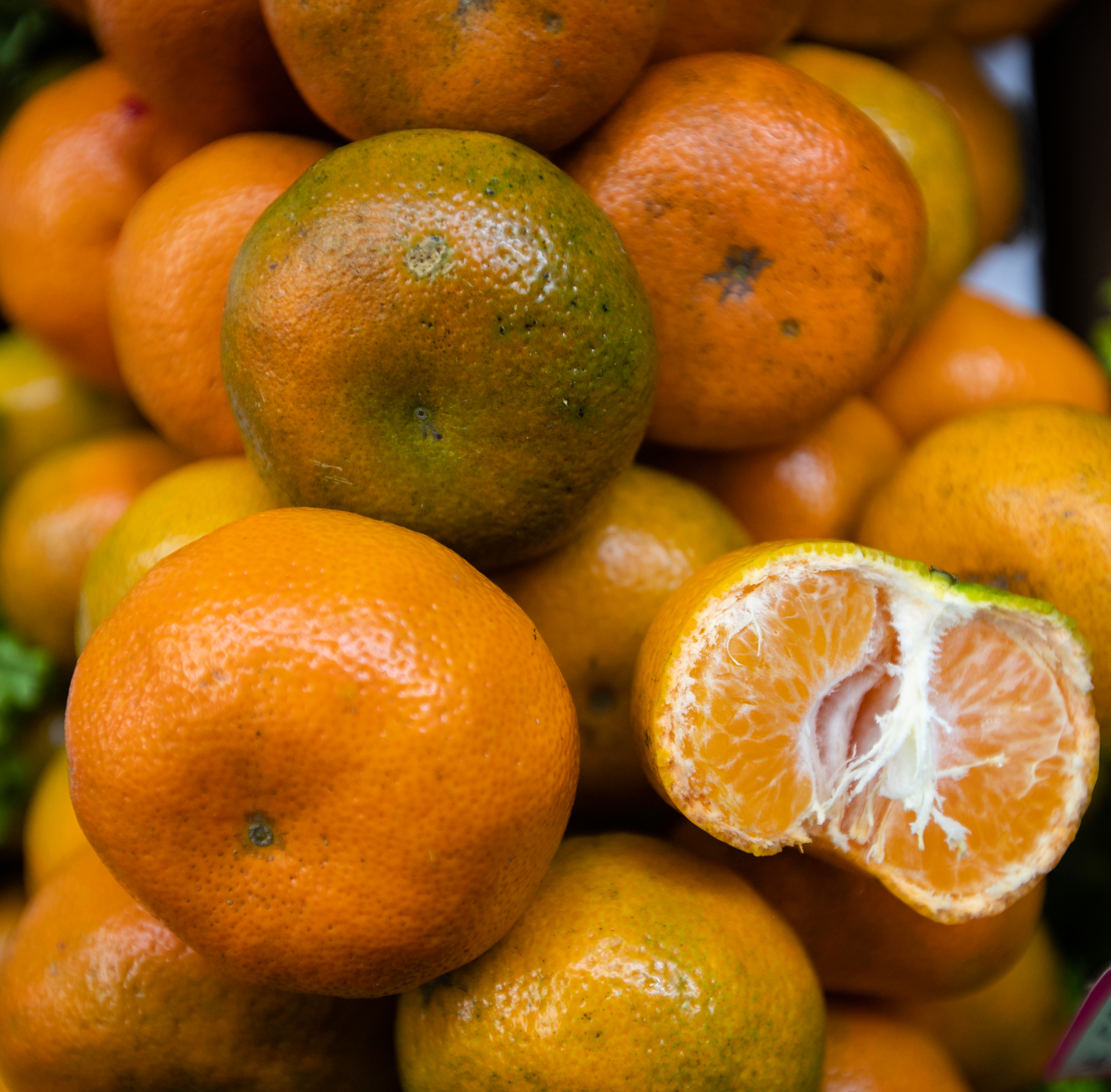 Produtos do Agro Paulista